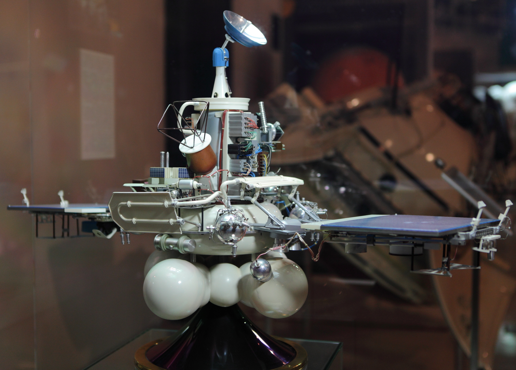 Макет атоматической межпланетной станции Фобос. АМС «Фобос» — серия советских автоматических межпланетных станций, предназначенных для исследования Марса и его спутника Фобоса.